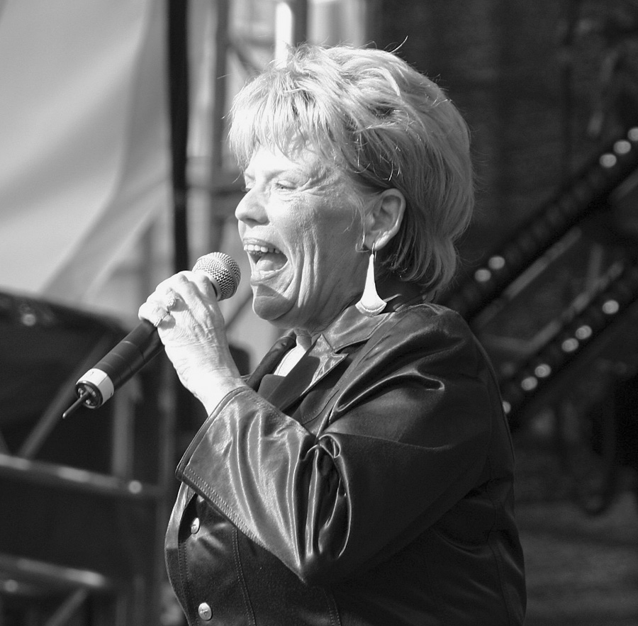 Greetje Kauffeld, Dutch jazz singer Cologne Ringfest, 2005-08-28 author: Elke Wetzig (elya)